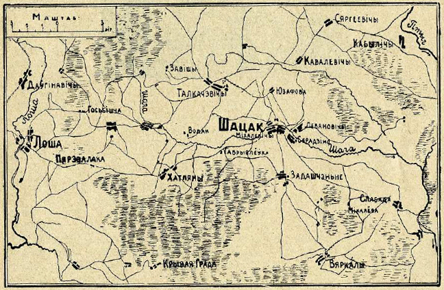 Беларуская (тарашкевіца): Шацак (Šacak) на мапе